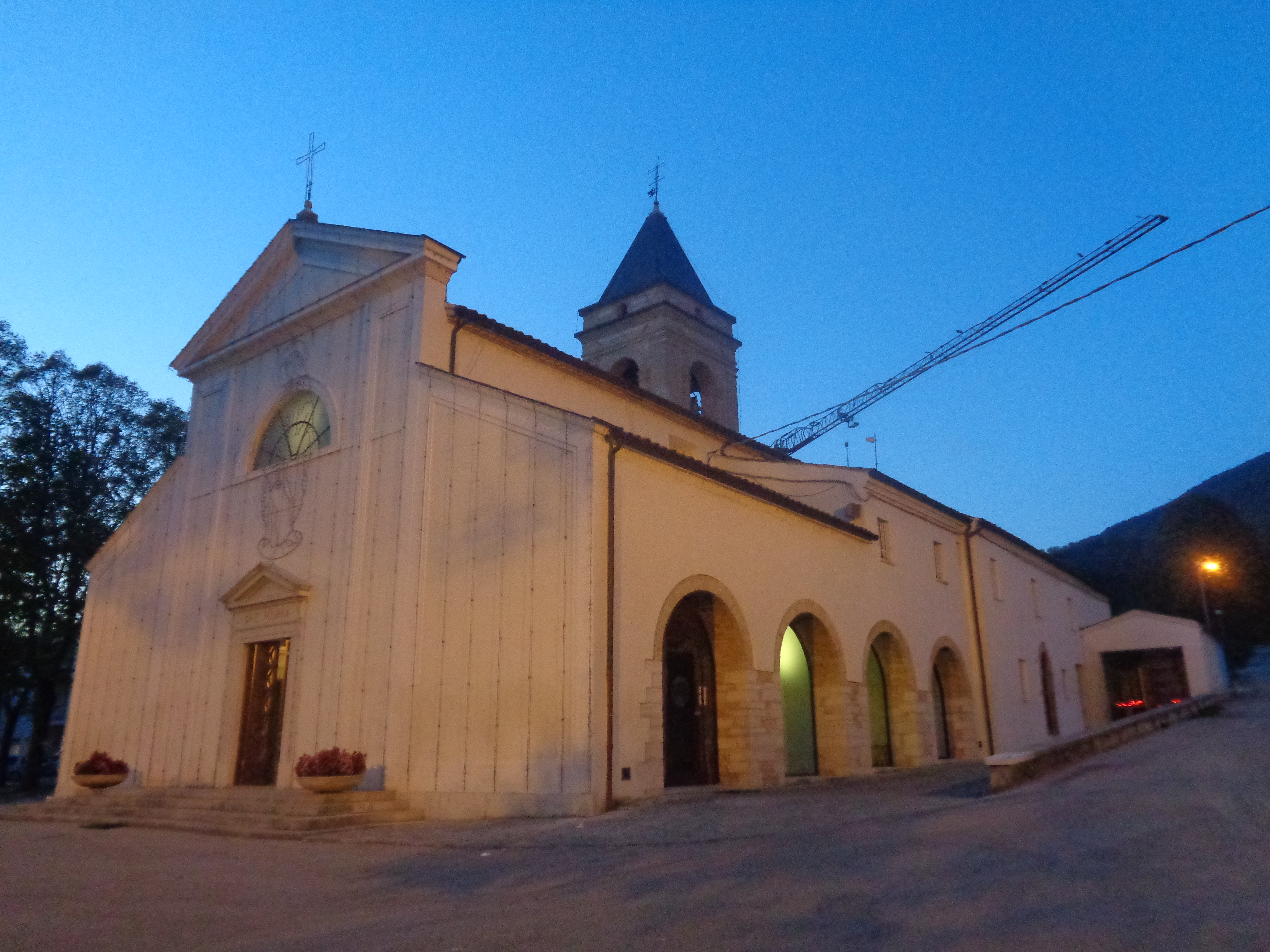 Santuario del Pelingo This is a photo of a monument which is part of cultural heritage of Italy.